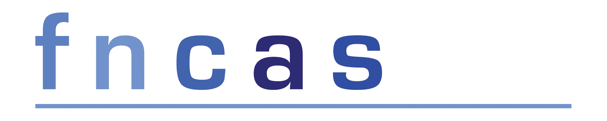 Logotype à utiliser selon les principes exposés de l'environnement graphique défini par la FNCAS